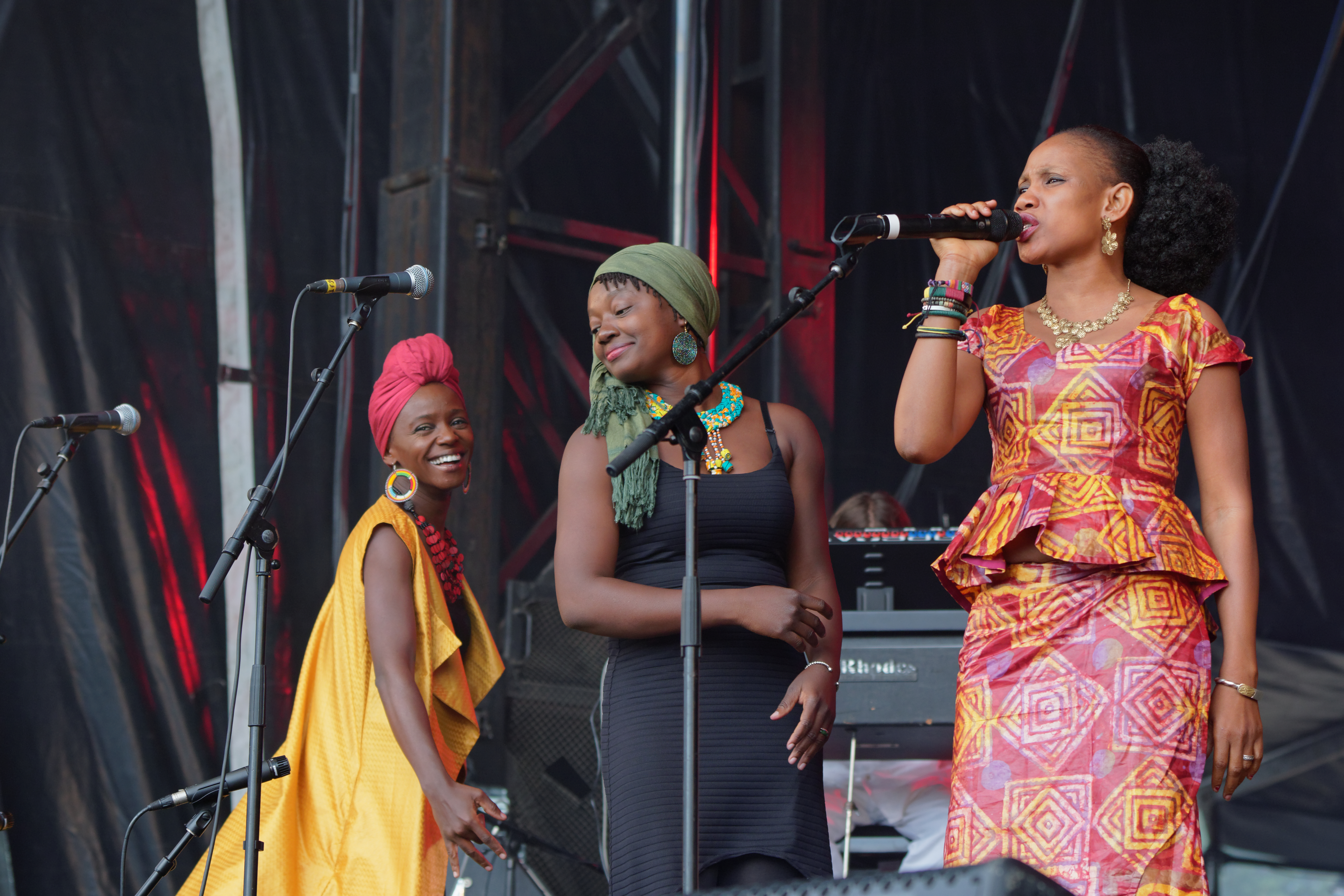 Les Amazones d'Afrique en concert sur la scène Landaoudec lors du festival du Bout du Monde 2016 à Crozon dans le Finistère (France). Left=Pamela Badjogo